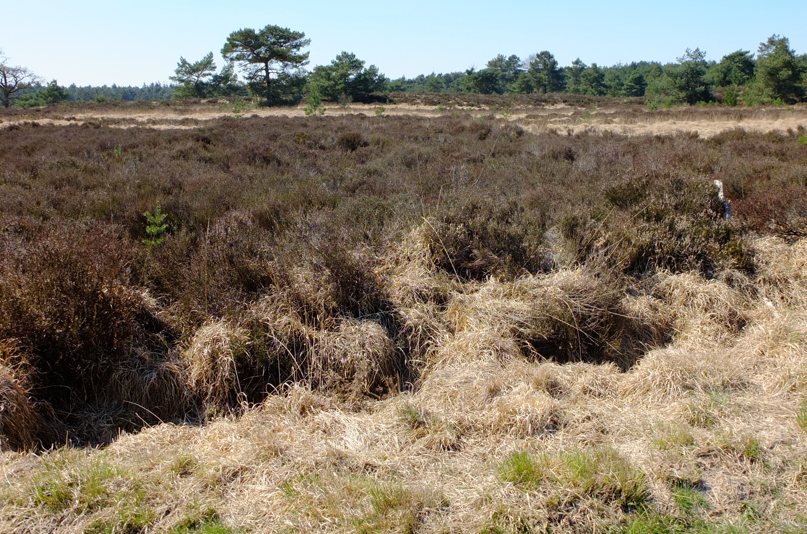 De Groote Meer